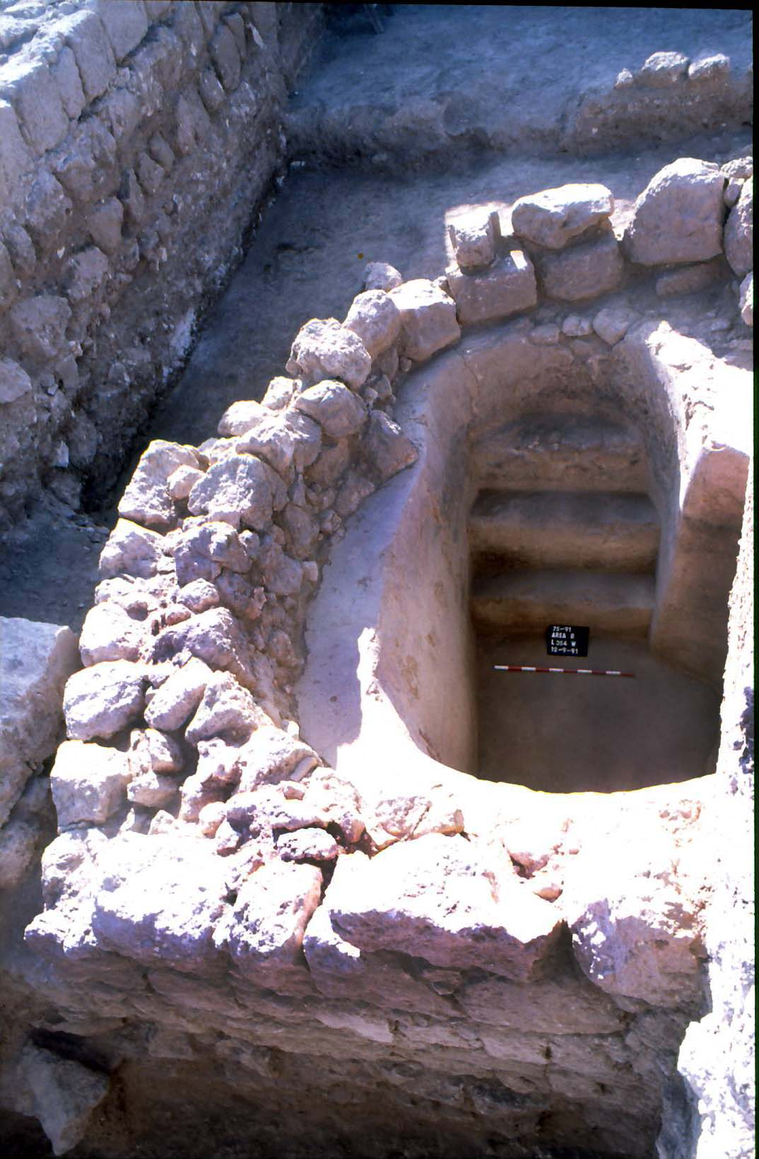 חורבת עוצה - כבשן כלי חרס משכבה 8 שהוסב למקווה טהרה או כברכה ששימשה לפילום הטין של כלי החרס. צילם הווארד סמיטליין